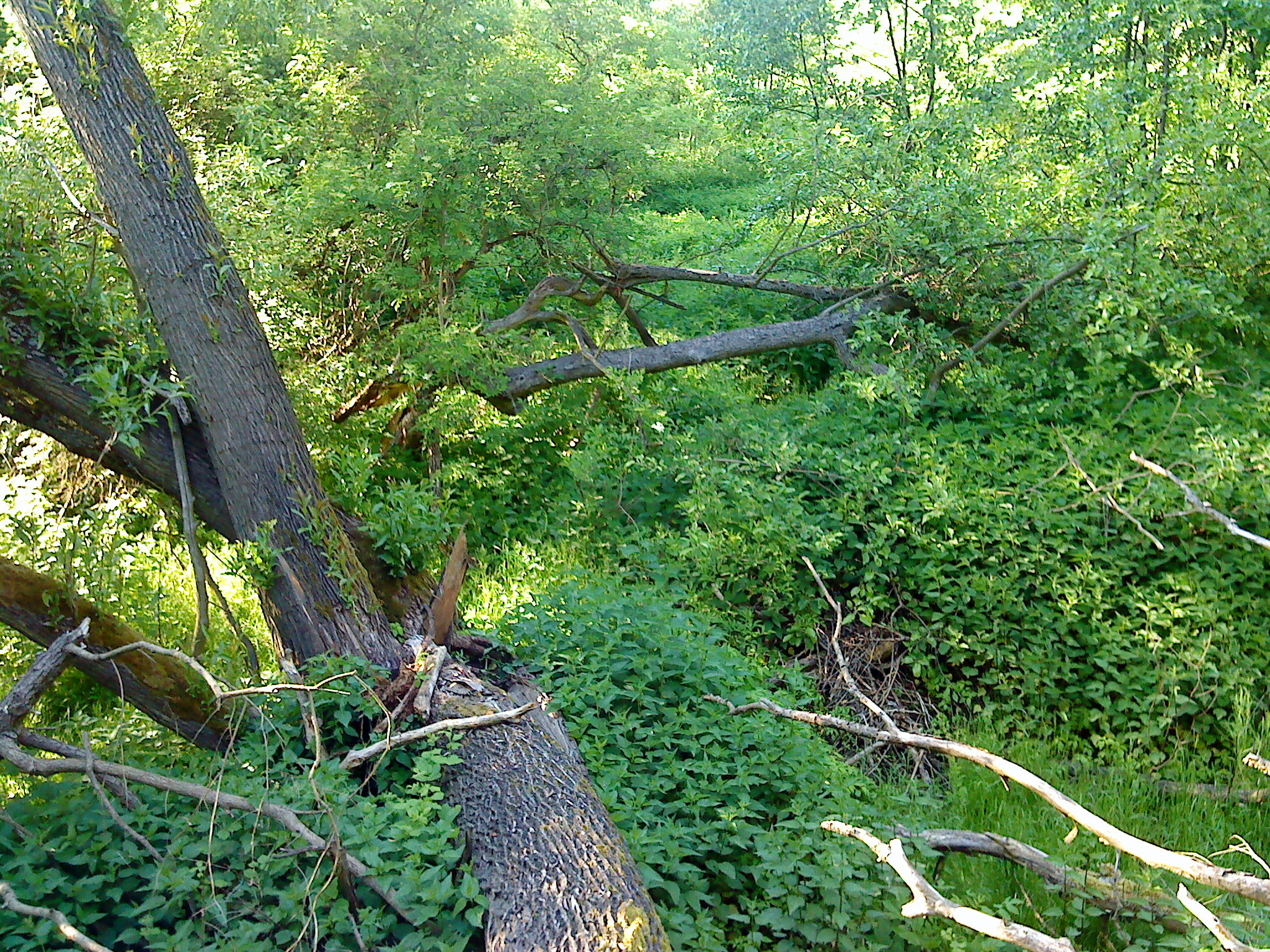 Křížkový Újezdec-Čenětice, pramen Botiče